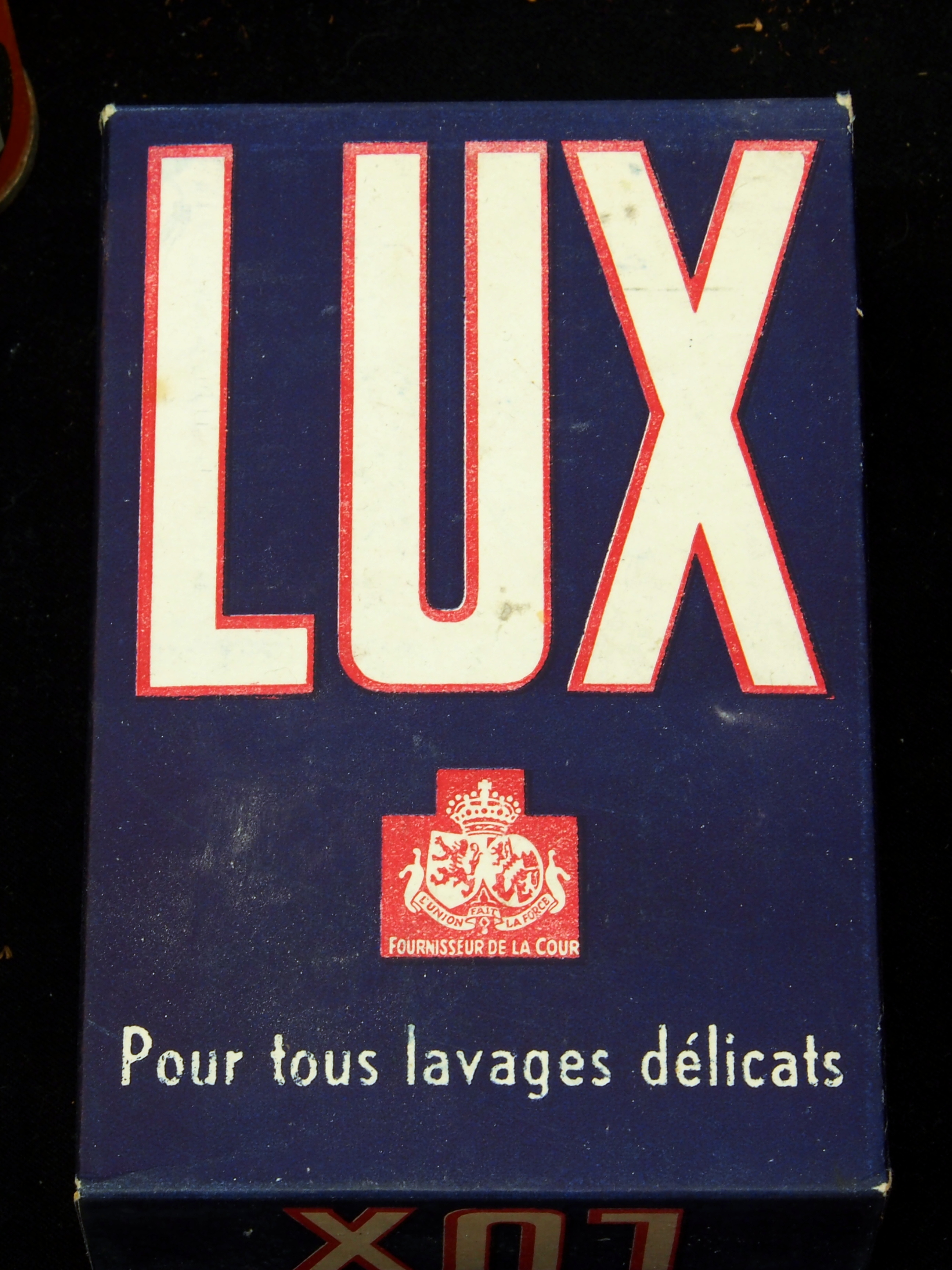 Lux wasmiddel.